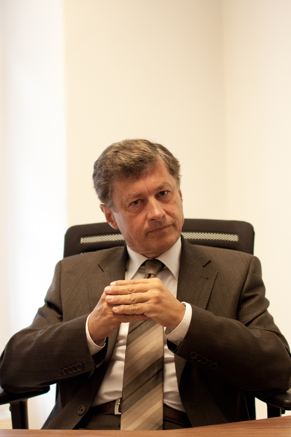 Gerhard Kurzmann, Nationalratsabgeordneter und steirischer Landesparteiobmann